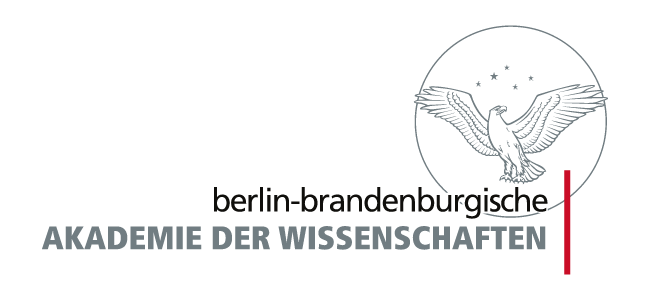 BBAW Logo